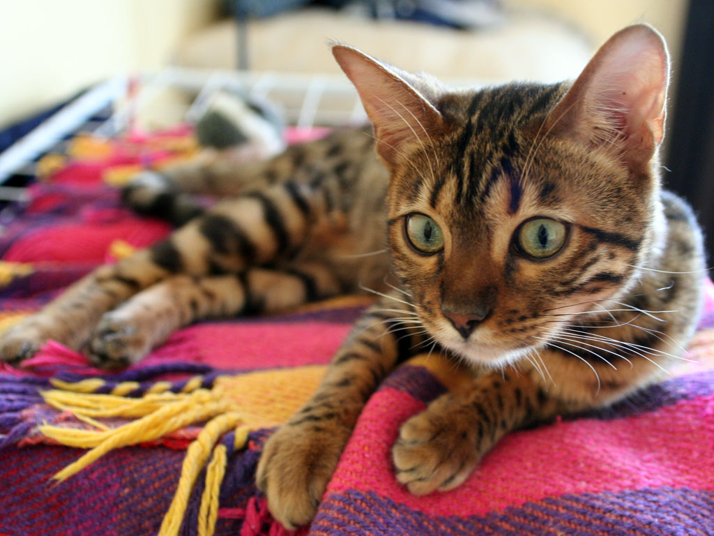 Bengalkatten Fia som vasker seg på tørkestativet, Marius Engesrønning, 13.05.2006